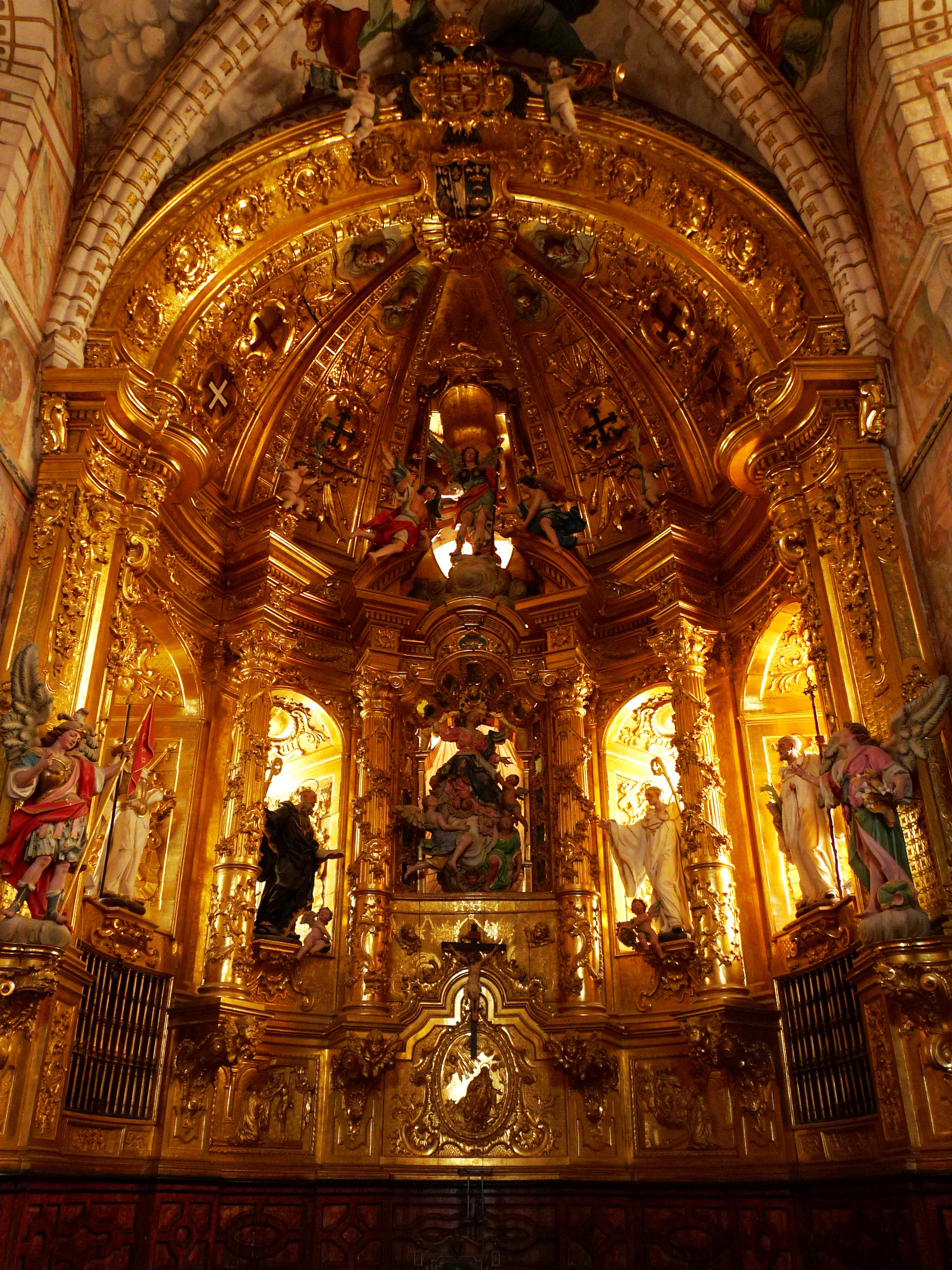 Monasterio de Santa María de Huerta - Ábside mayor (1766) dedicado a la Asunción de la Virgen - Según diseño de Felix Malo - Izq. esculturas de San Benito y San Rimundo de Fitero; dcha. San Bernardo y San Pedro de Castronovo.